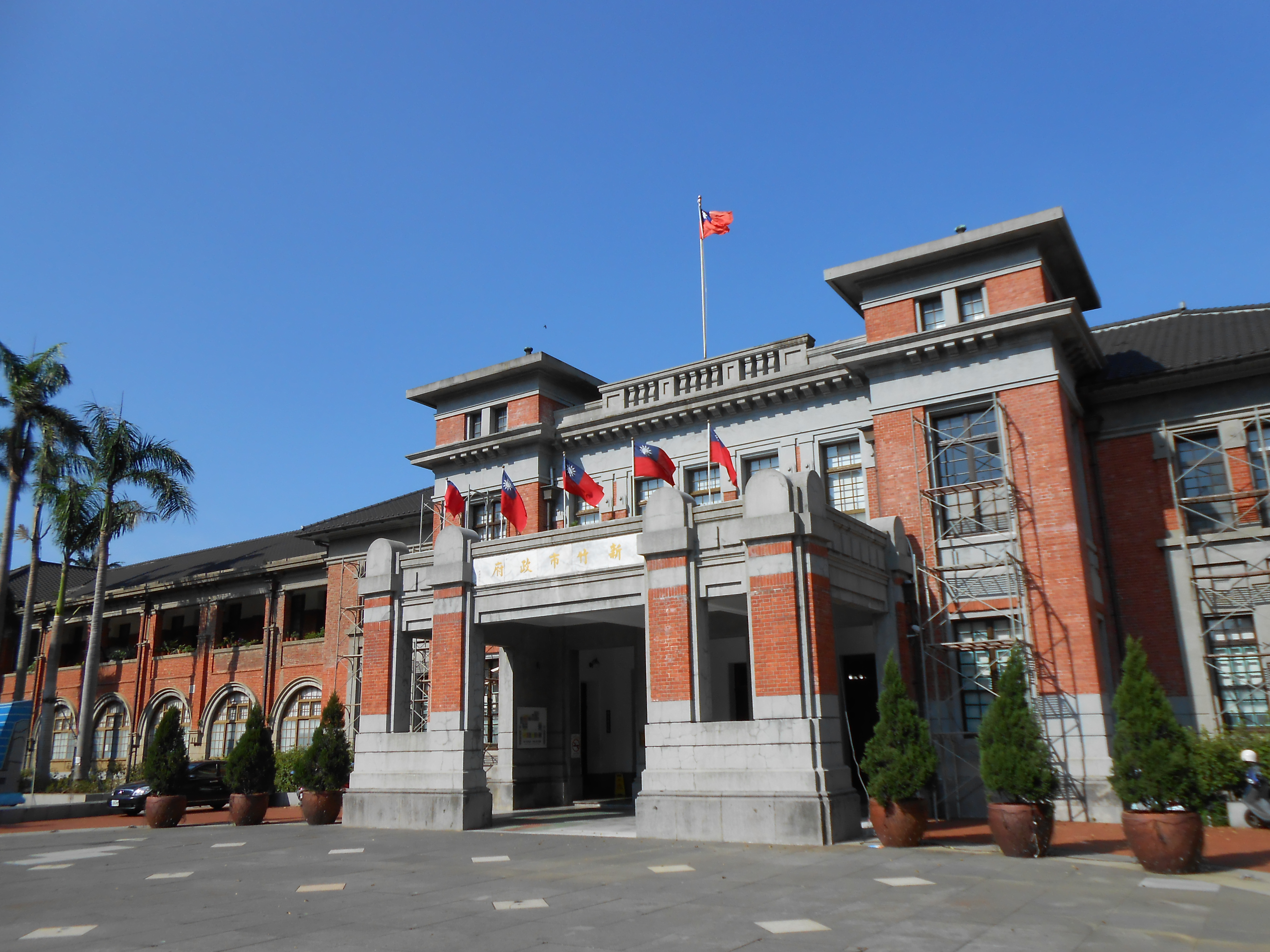 新竹州廳（新竹市政府）